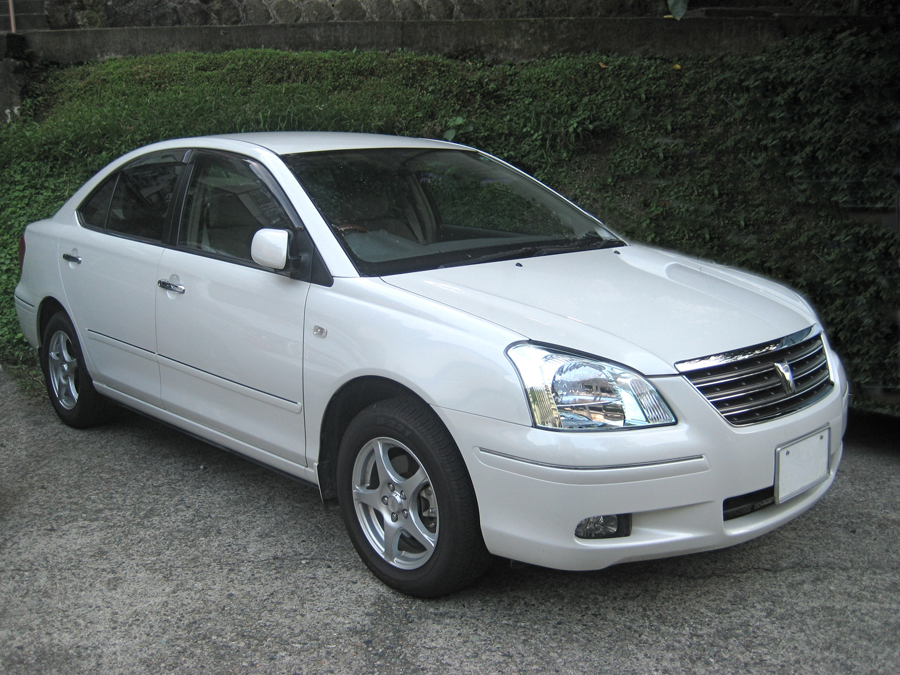 Document destiné à illustrer l'article sur la Toyota Premio